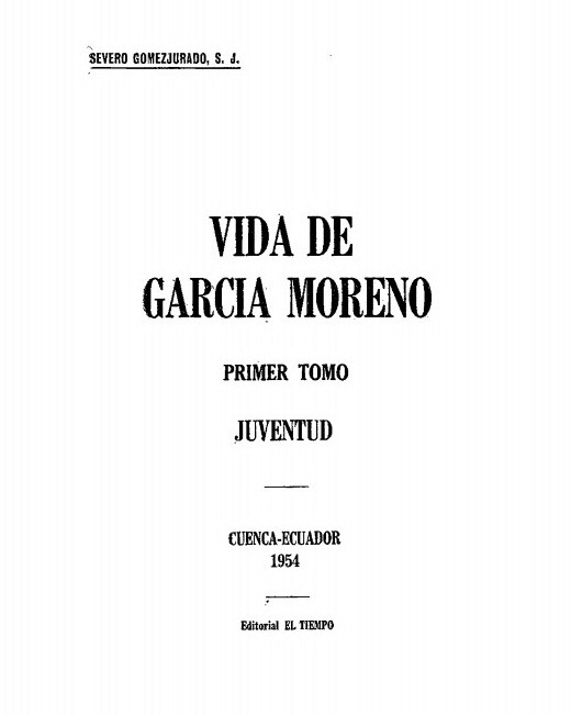 Imagen del primer tomo de Vida de García Moreno